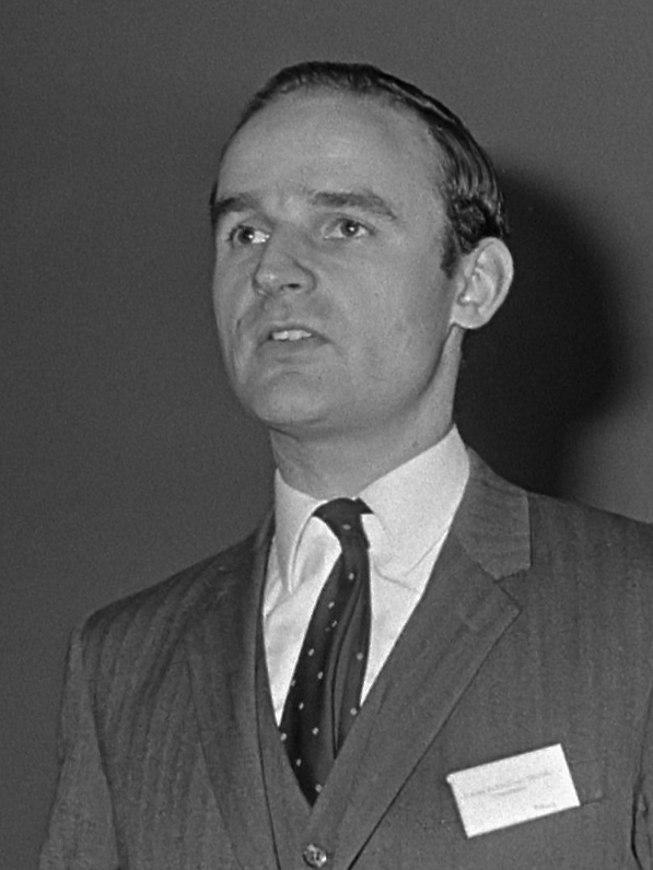 Interacademiaal Oost West congres "Views on Europa" in Amsterdam prof.dr.jhr. F.A.M. Alting von Geusau 15 januari 1969